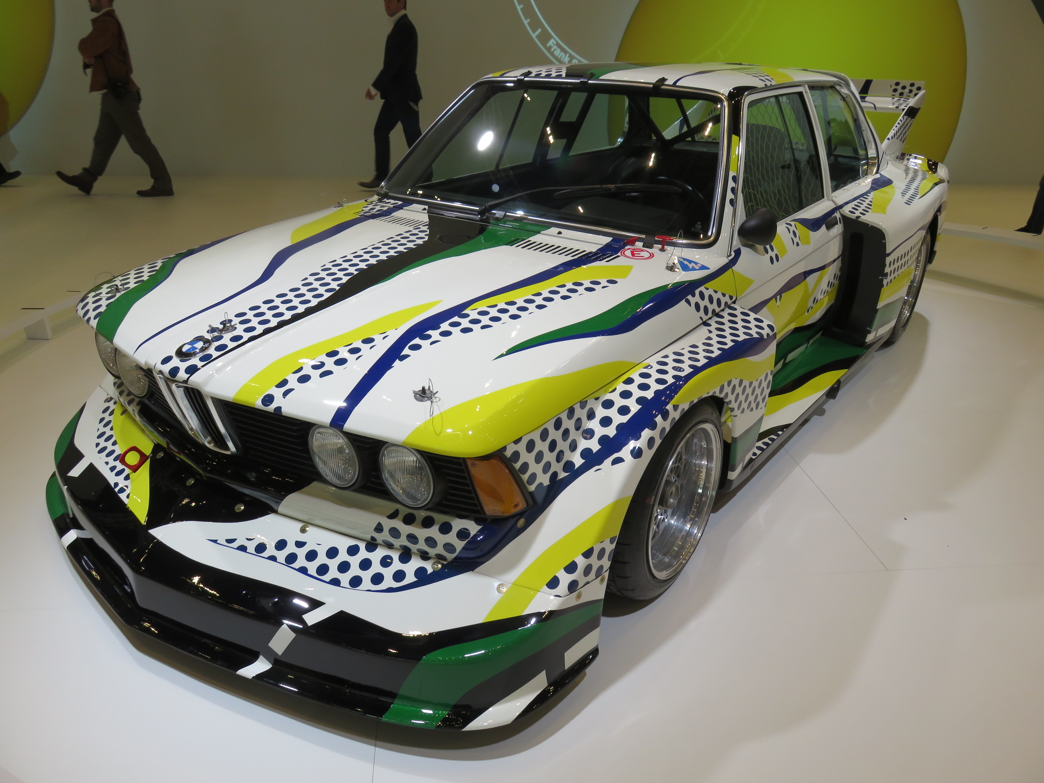 Concorso d'eleganza Villa d'Este 2015